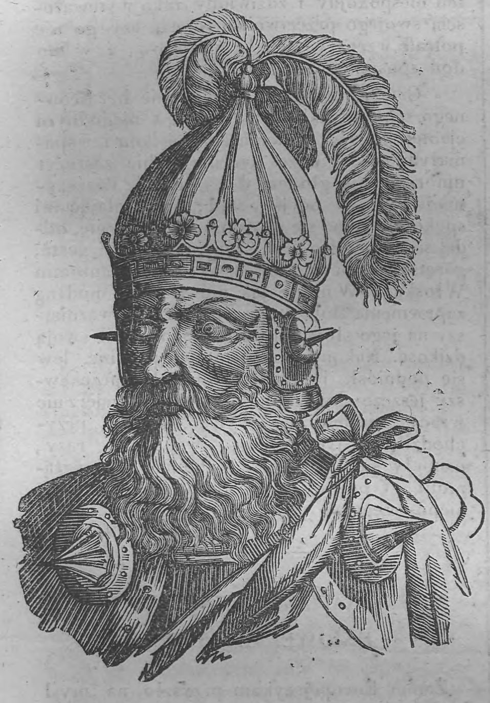 Беларуская (тарашкевіца): Партрэт караля Міндоўга